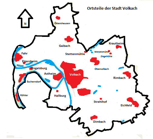 Karte Volkach mit allen Ortsteilen, Legende: schwarz- Gemeindegrenze Volkach, blau- Fluss Main, Seen, rot- besiedelte Fläche